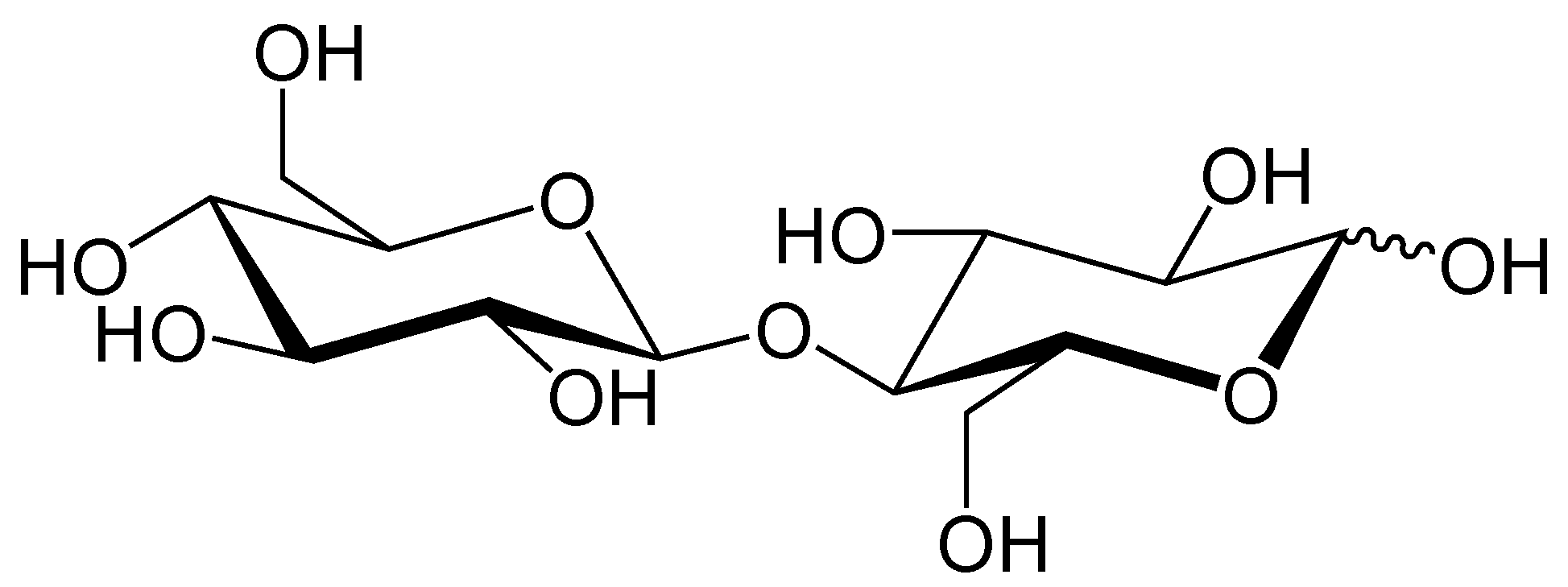 Cellobiose (die wellige Bindung bedeutet, dass die Stellung der Hydroxylgruppe nicht festgelegt ist)